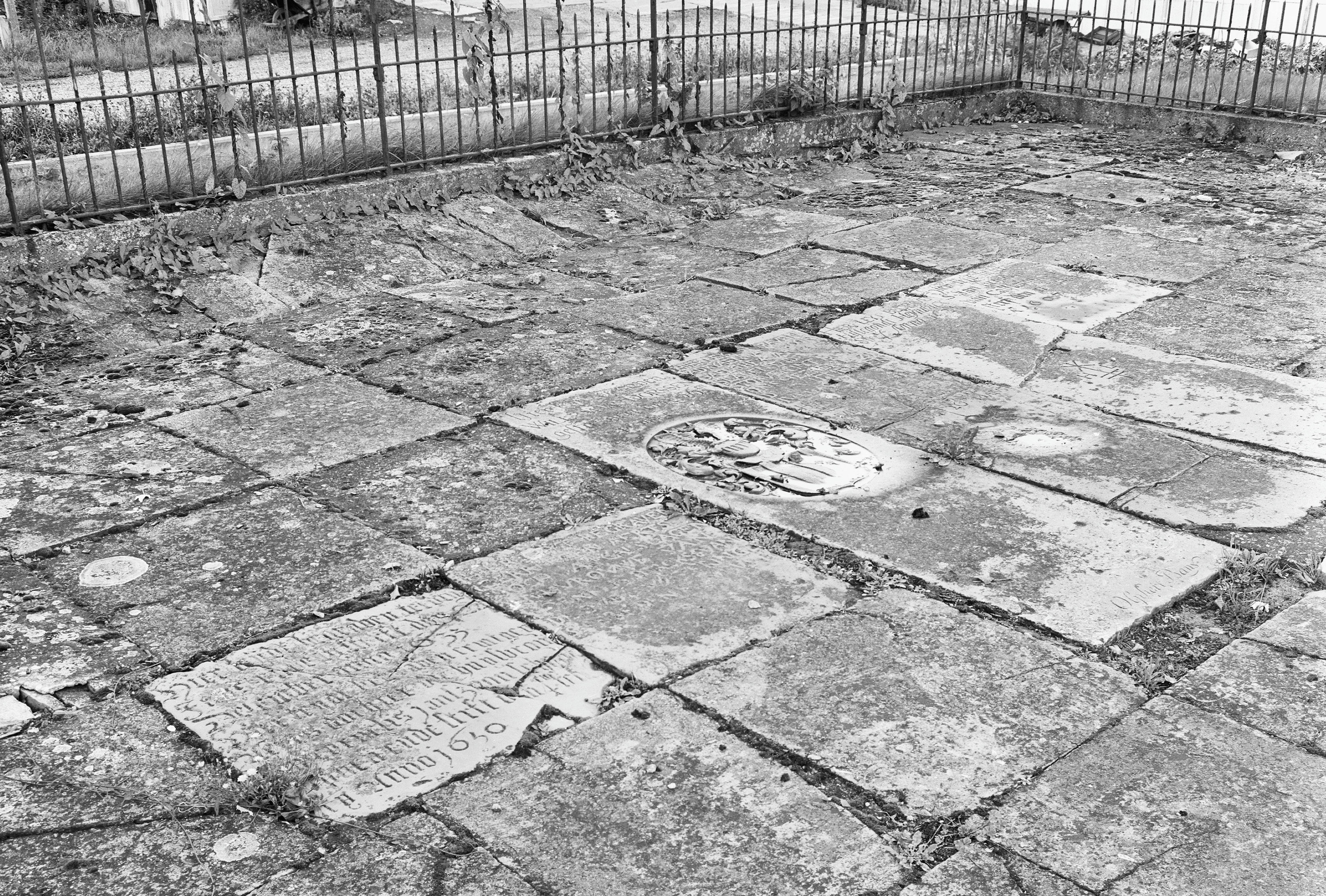 Diversen: Begraafplaats, overzicht